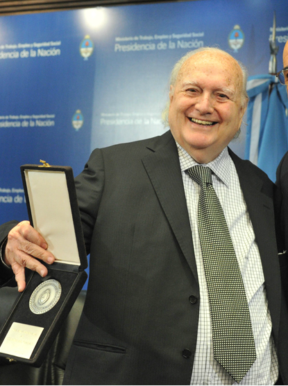 Juan Carlos Fernández Madrid al recibir una distinción en 2015